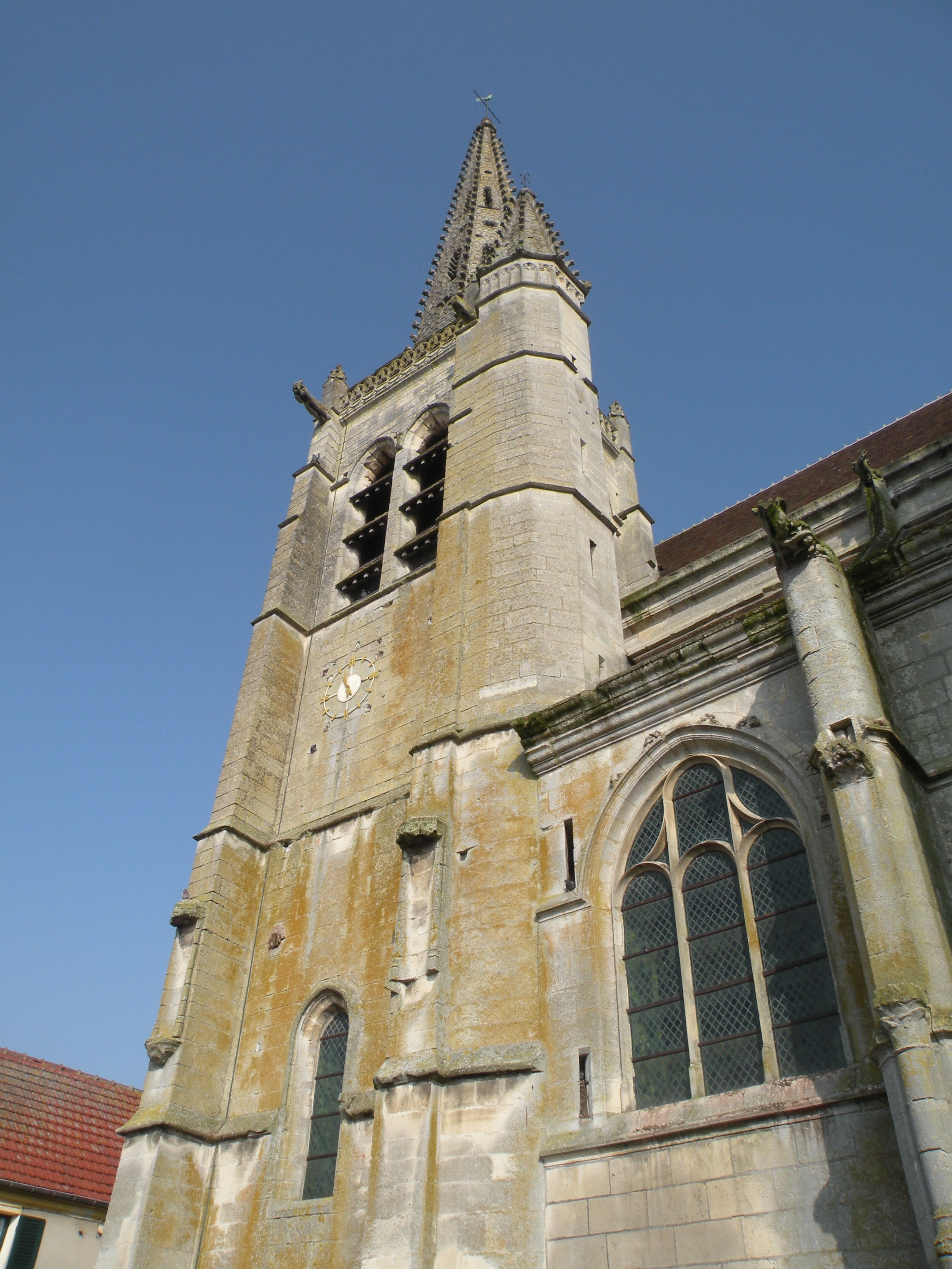 Église Saint-Pierre-et-Saint-Paul de Baron